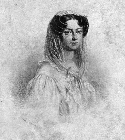 Die Schauspielerin Theres Krones, Lithographie von Albin Decker